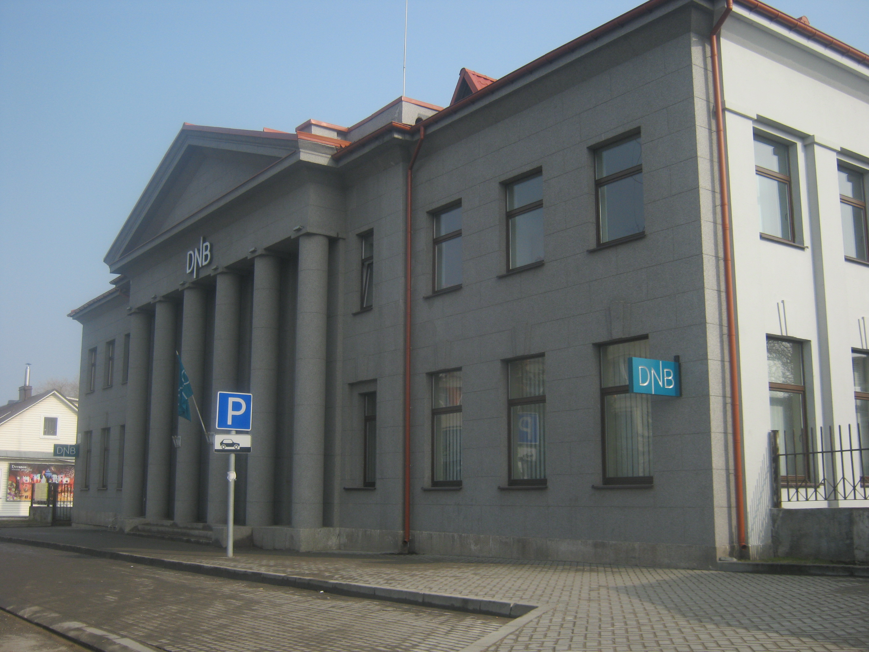 Ukmergė